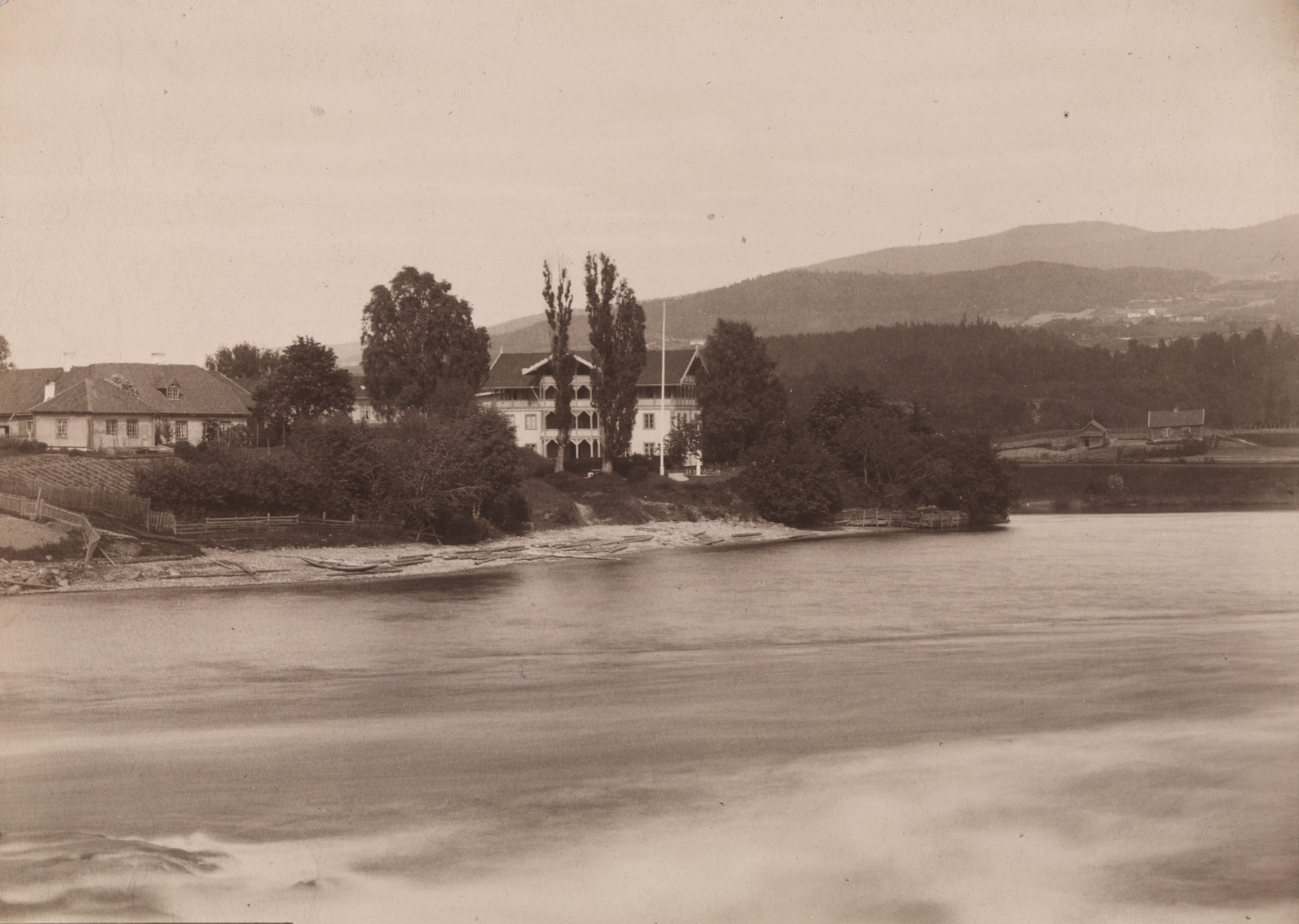 Ringerike, Glatvedts Hotel Sted: Hønefoss Kommune: Ringerike Fylke: Buskerud Tagger: hoteller landskapsfotografi